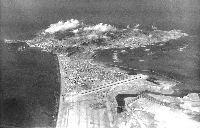 منظر من الجو لاجزاء من عدن كريتر خور مكسر المعلا التواهي